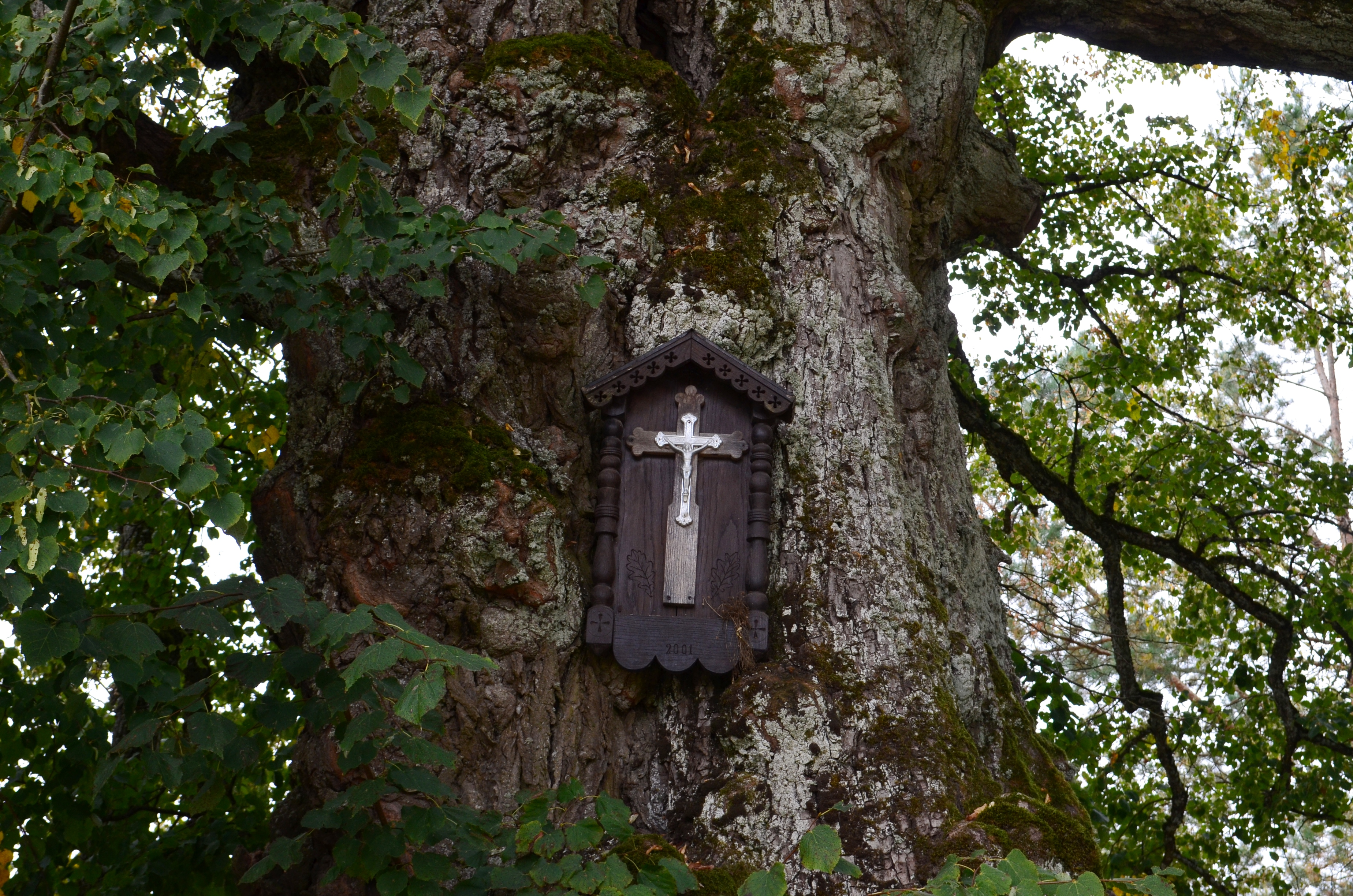 Braziūkų liepa Motinėlė, Kauno raj.